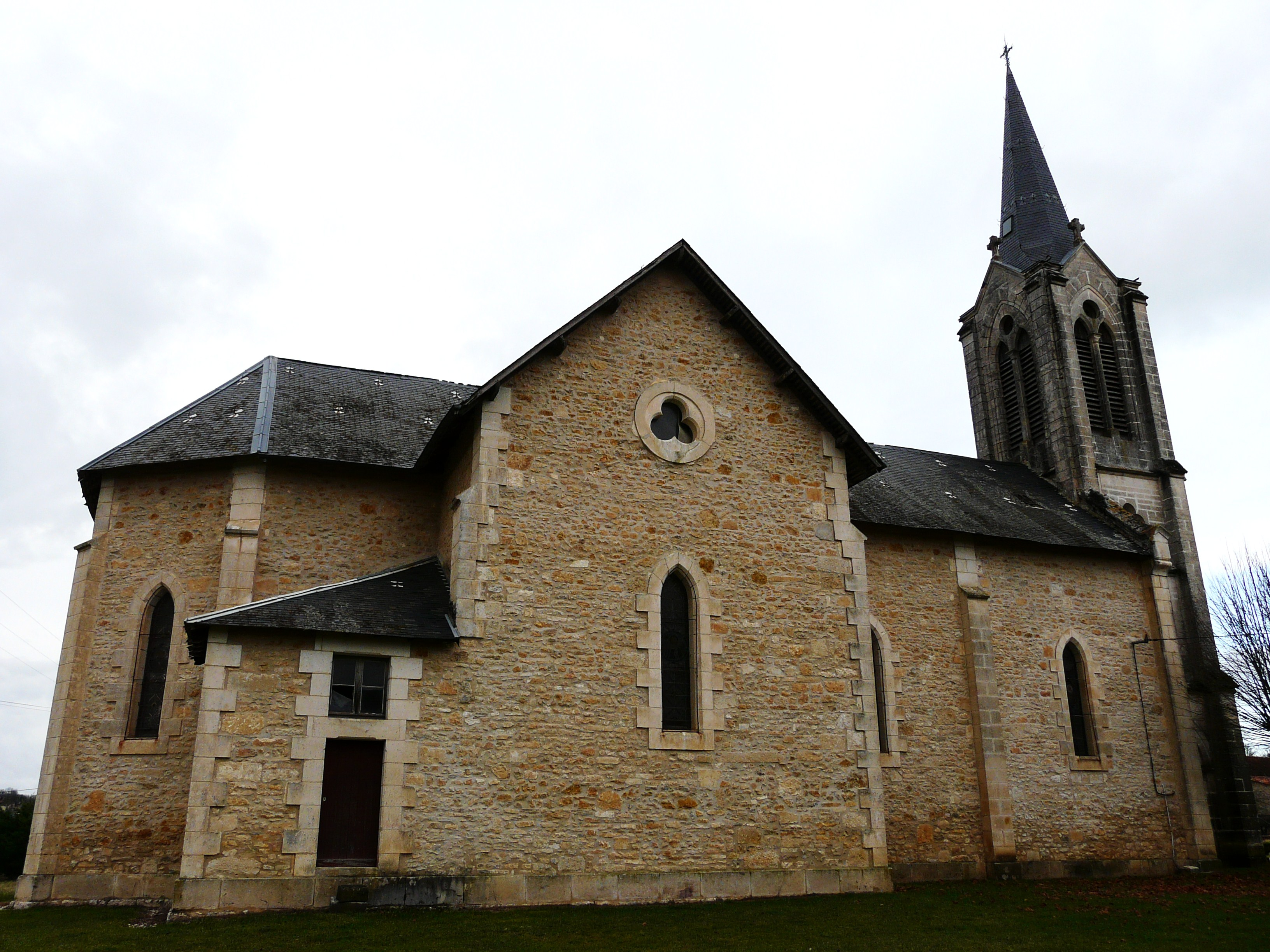 L'église Saint-Pierre-ès-Liens, Brouchaud, Dordogne, France